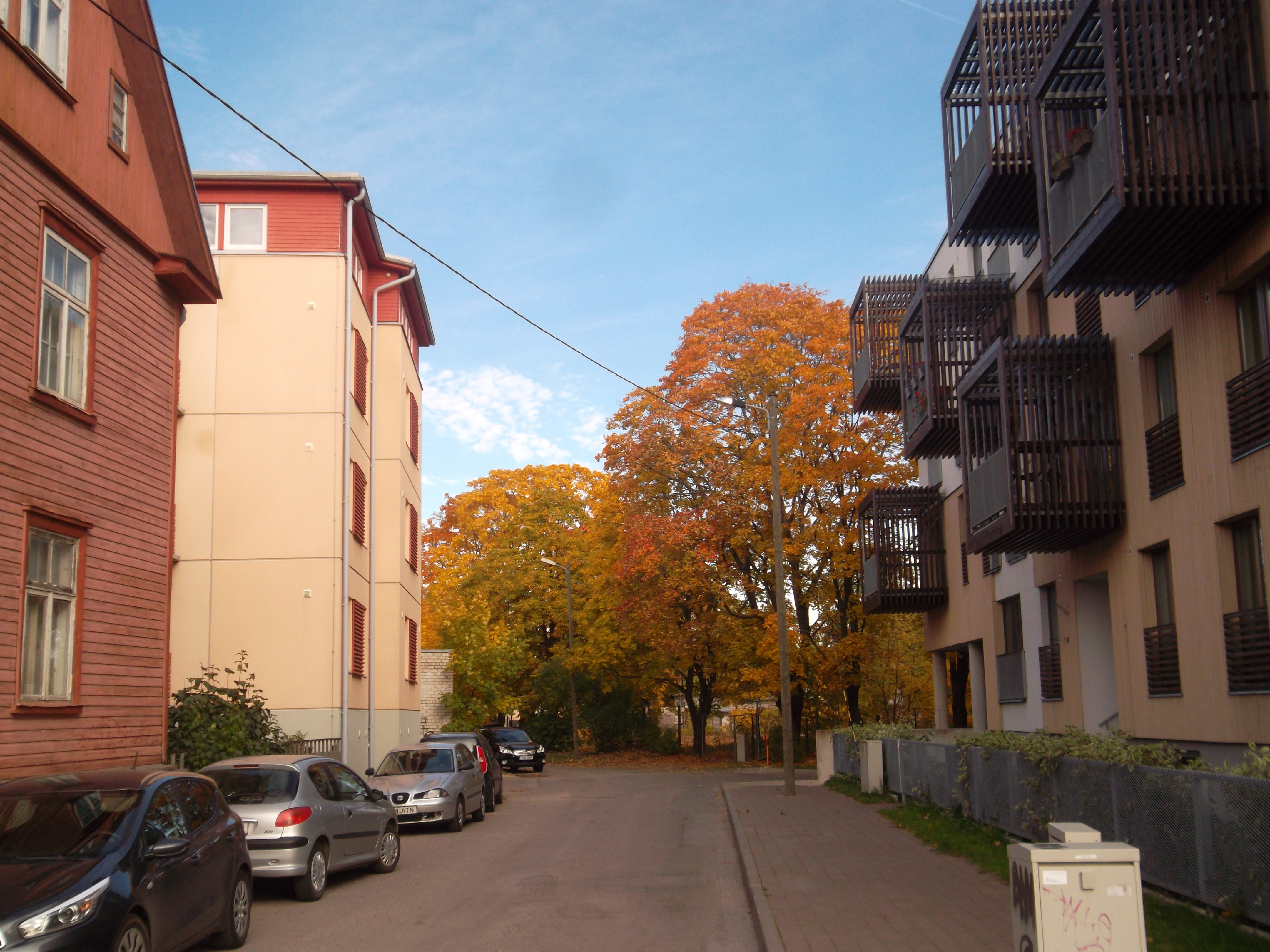 Улица Кеава в Таллине.